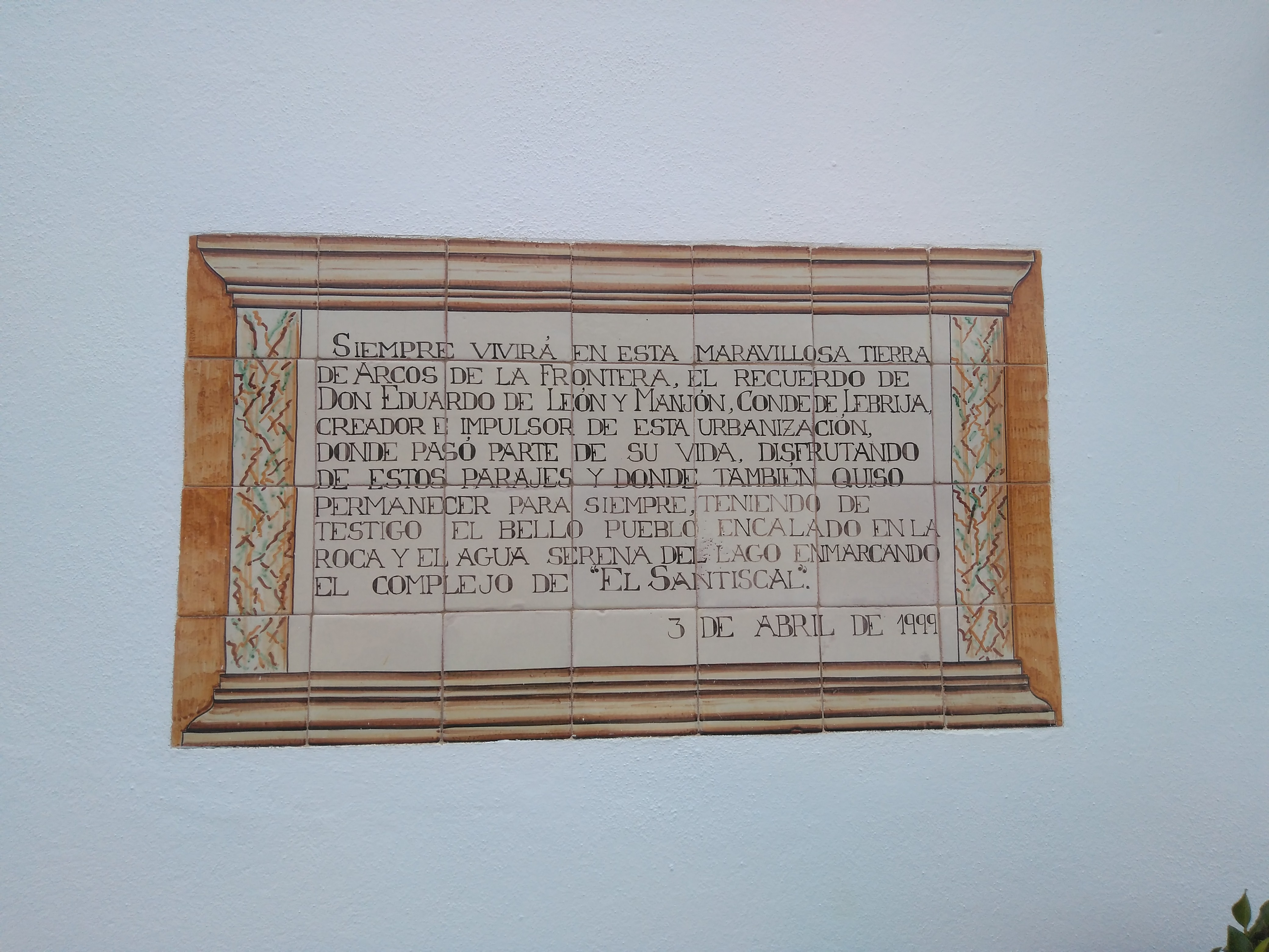 Placa en honor al Conde de Lebrija en El Santiscal, Arcos de la Frontera (España)